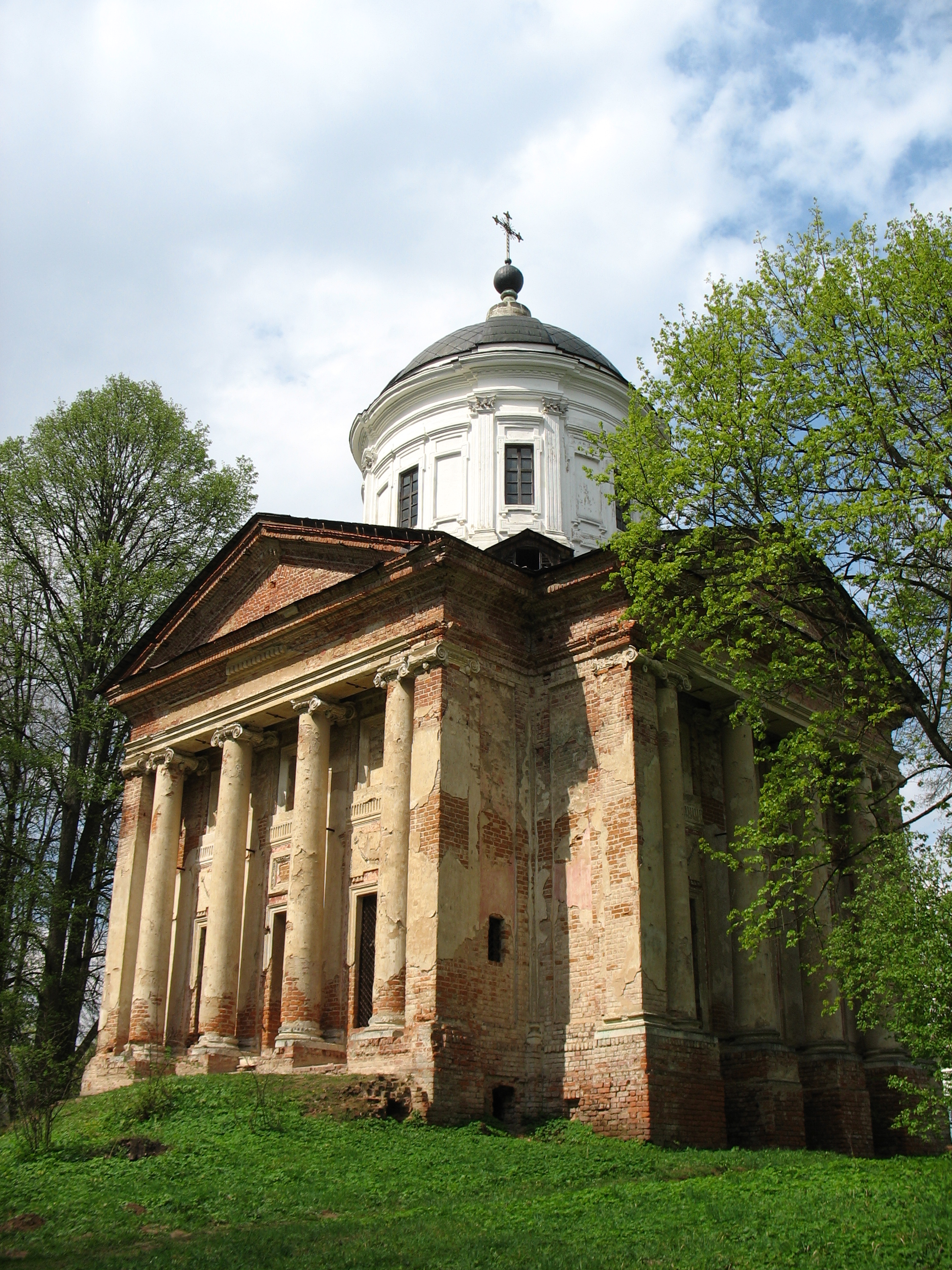 Церковь Михаила Архангела в Алексино (Дорогобужский район Смоленской области). 1794 год. Архитектор М. Ф. Казаков